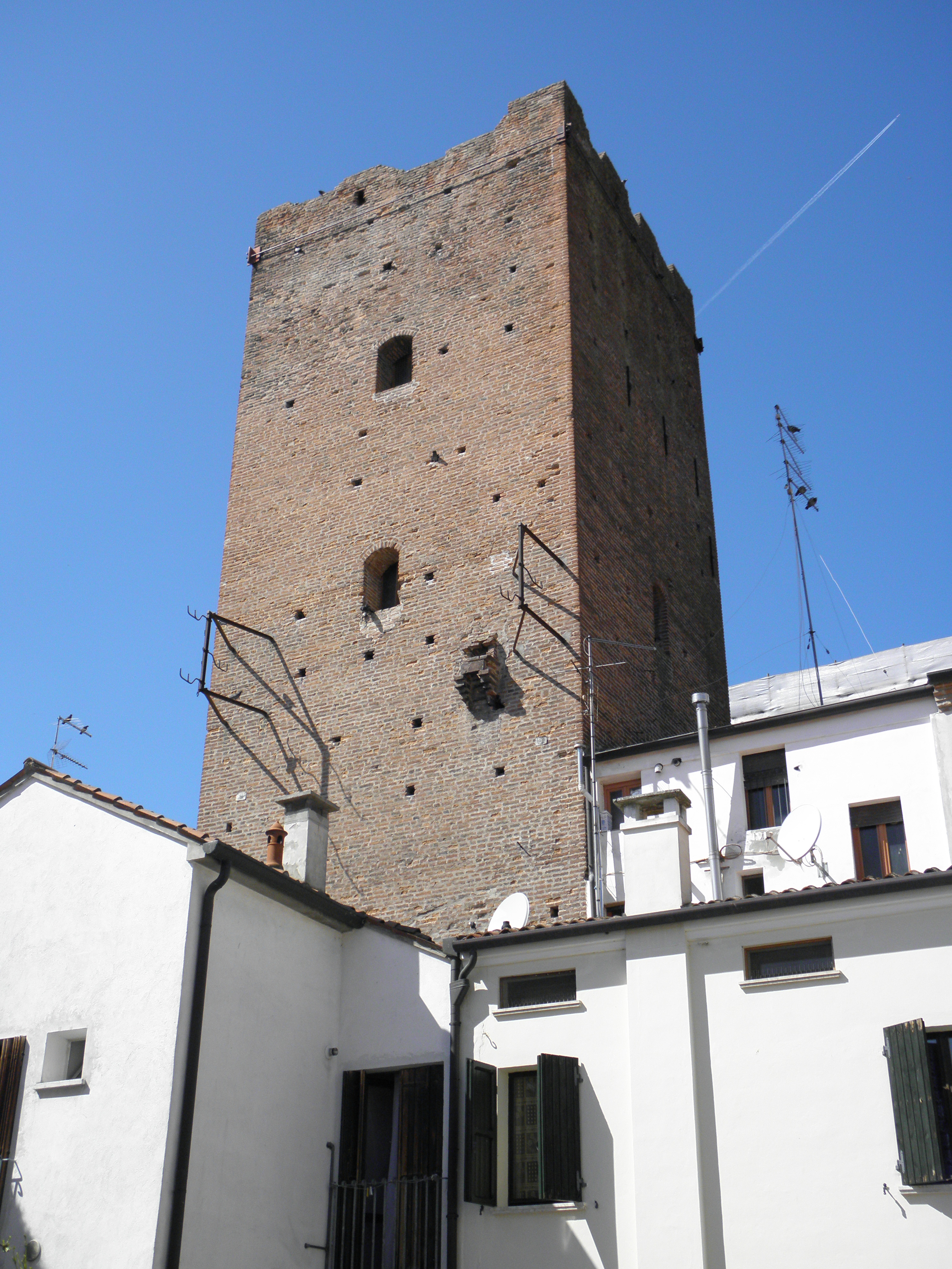 Rovigo: la Torre Pighin vista da Via Tiziano Vecelio.